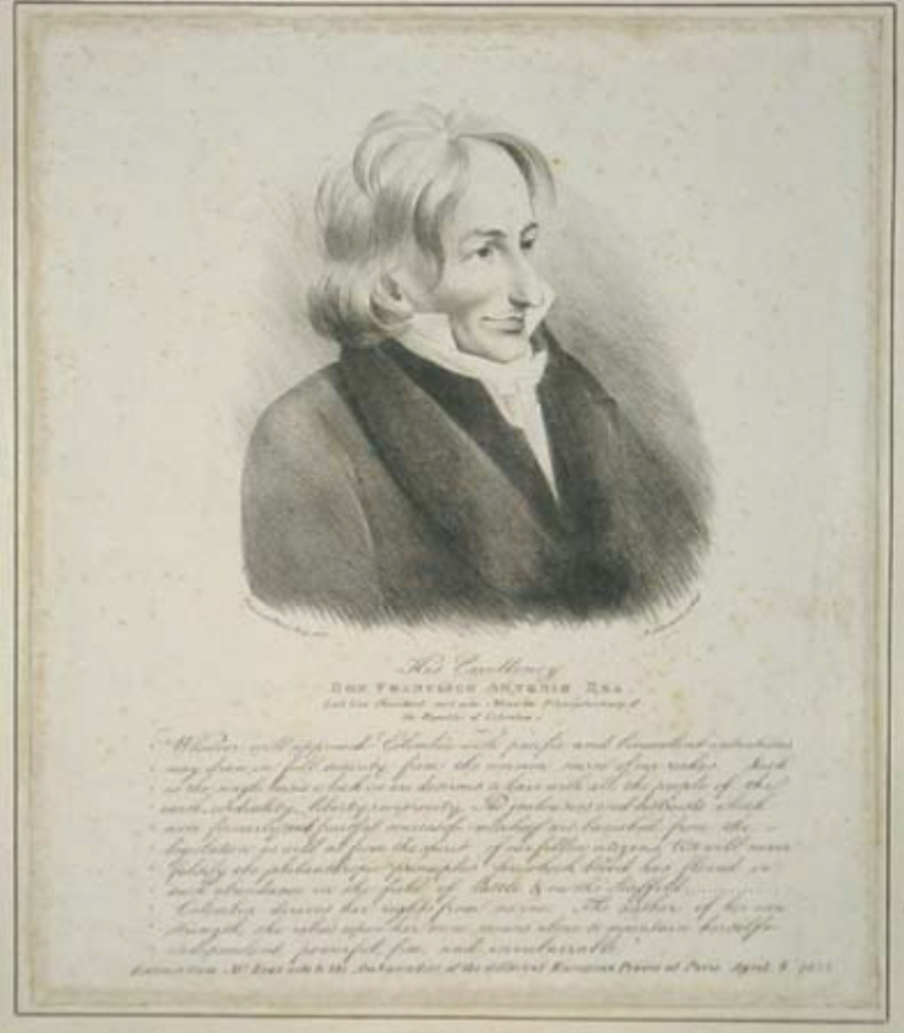 Francisco Antonio Zea (* 21. Oktober 1770; † 28. November 1822), kolumbianischer Botaniker und Politiker.